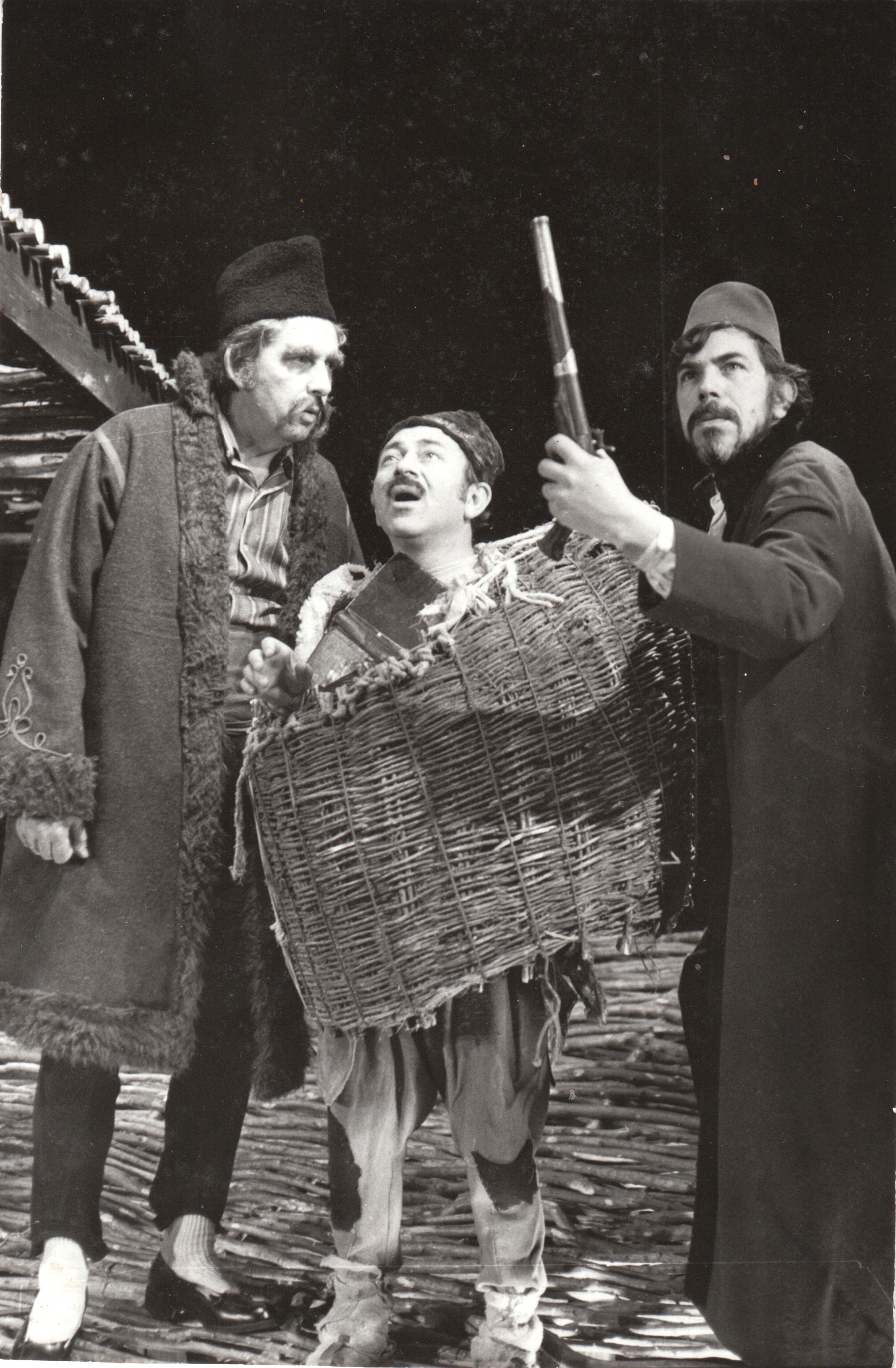 „От земята до небето“ – режисьор Слави Шкаров Минко Минков в средата в ролята на Сапуна, отдясно Климент Михайлов в ролята на Кесяка